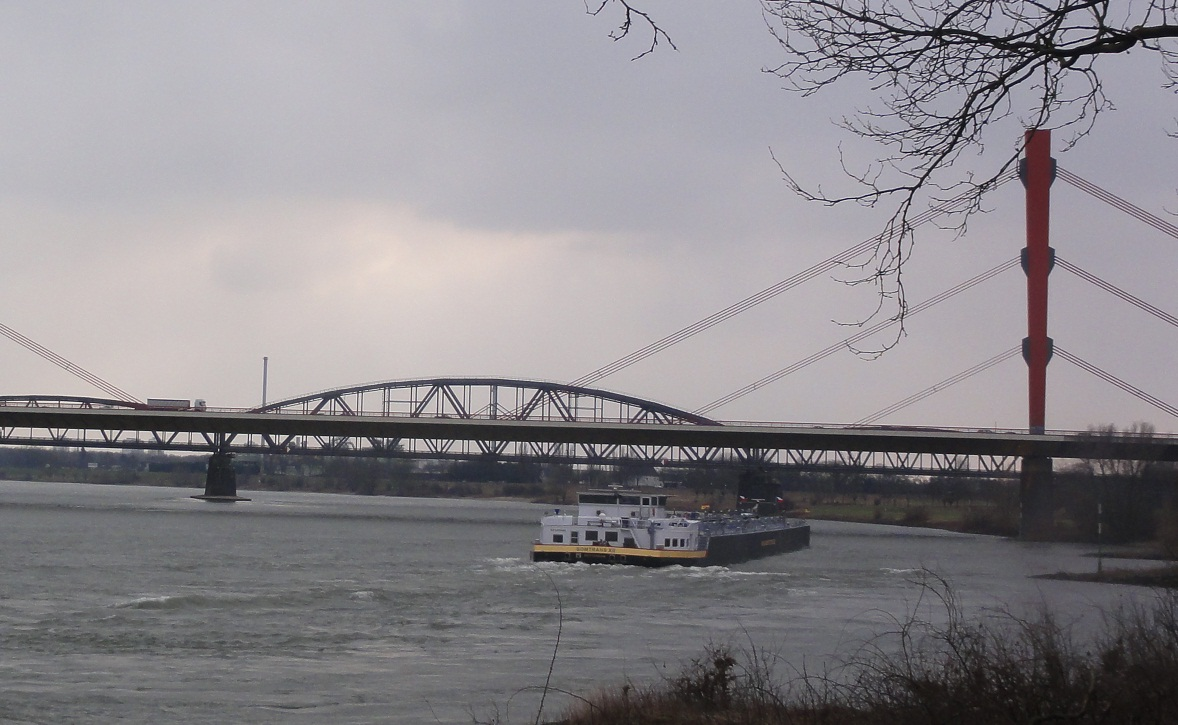 Brücke A42 über dem 1275 bis 1596 untergegangenen Dorf